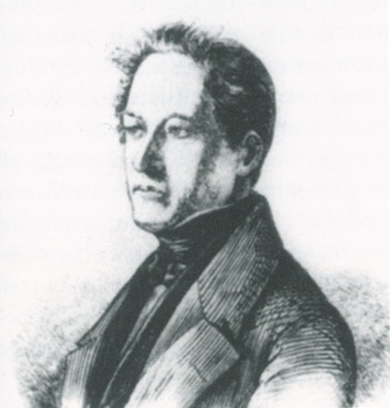 Peter Otto Clauß, deutscher Unternehmer und Politiker